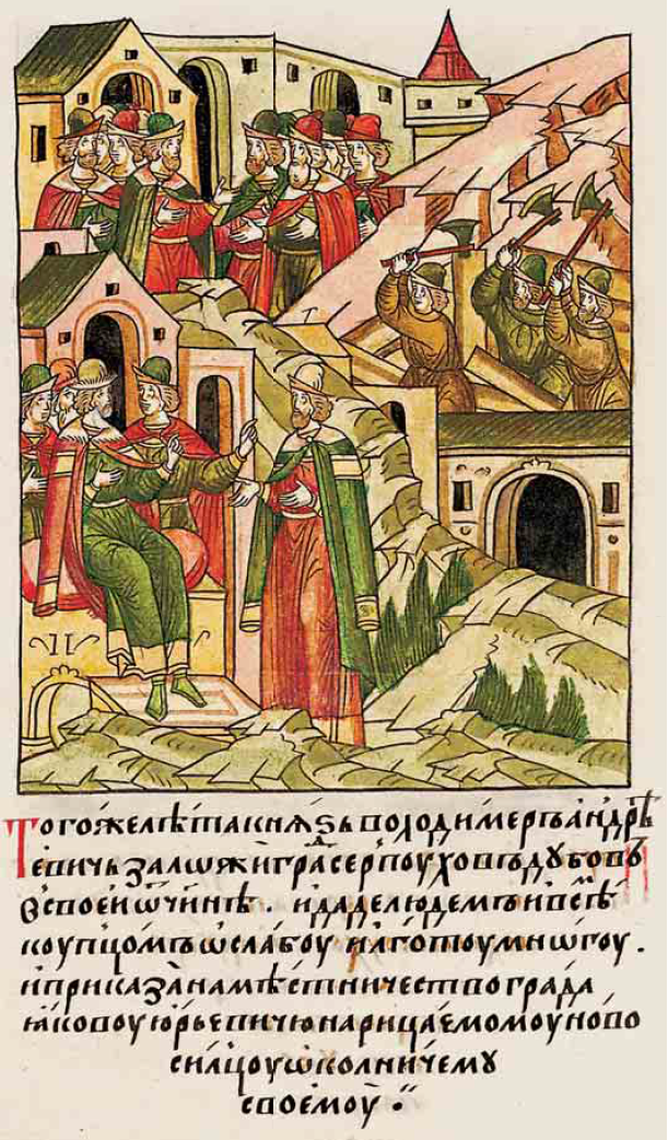 Лицевой летописный свод 9 том страница 24 "Того же лета (6882) князь Володимеръ Андреевичь заложи градъ Серпуховъ дубовъ в своей Отчине, и даде людемъ всемъ купцомъ ослабу лготу многу и приказа наместничество града Якову Юрьевичю нарица ему Новосильцу окольничему своему"